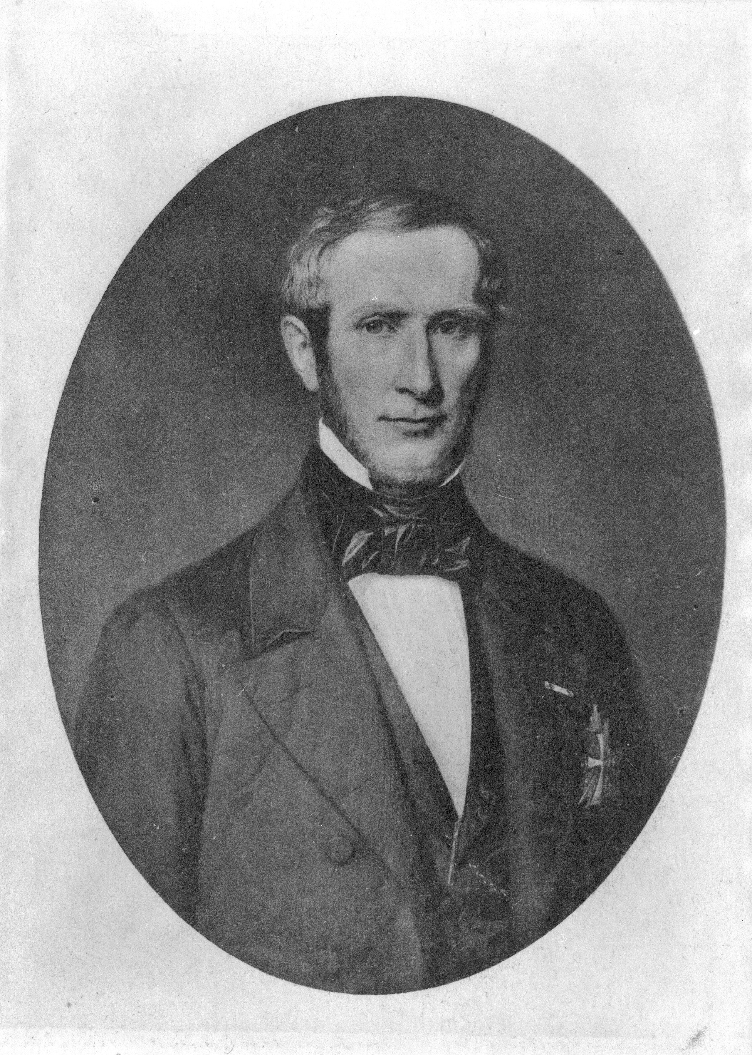 Carl Emil Bardenfleth (9. maj 1807 - 3. september 1857) dansk embedsmand og politiker.